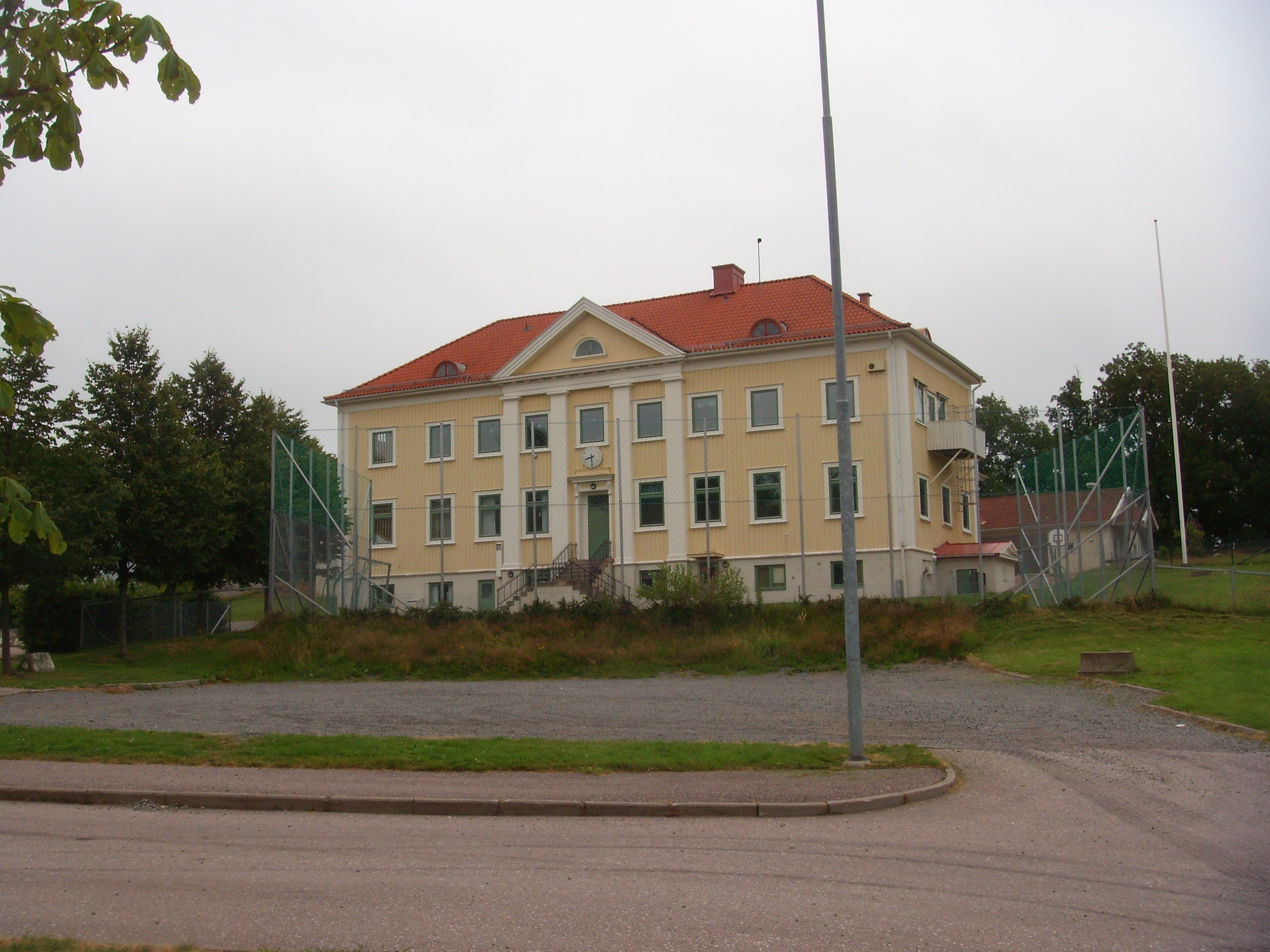 Gamla skolan i Ahlafors